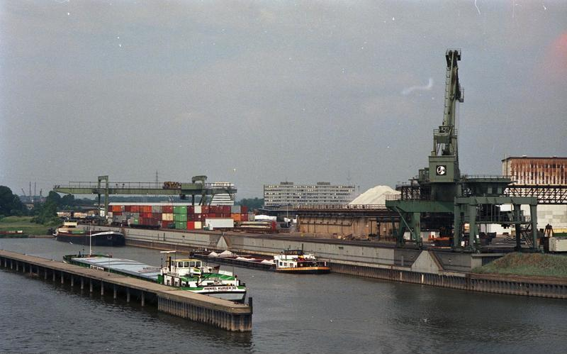 Juni 1988 Frankfurt-Hoechst AG (Chemiewerk): Hafen